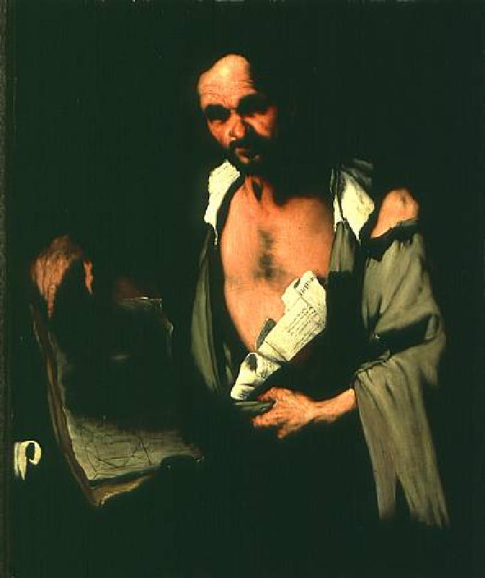 Pythagoras.